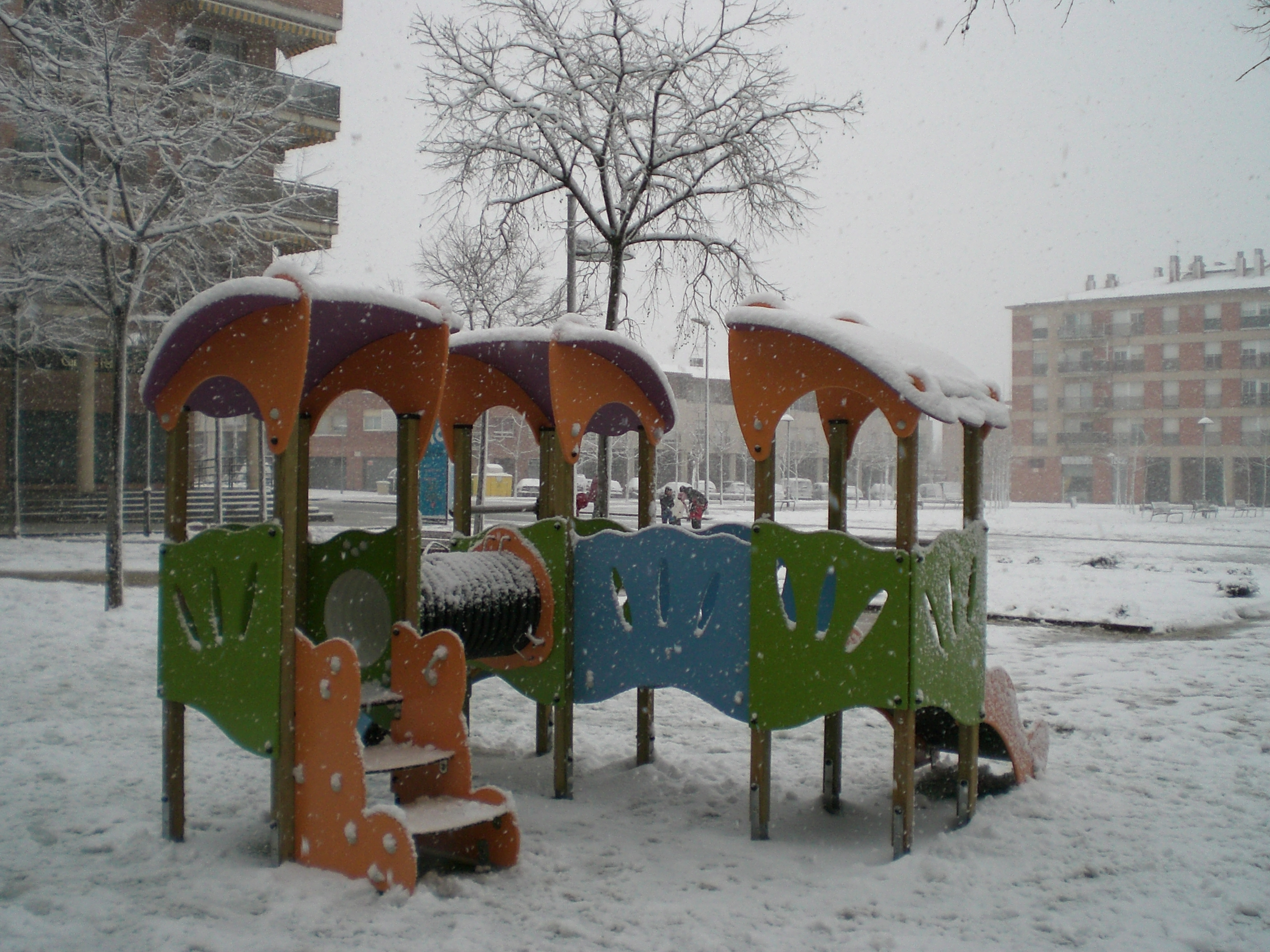 Snowing in castellar del Vallès (Europe square)